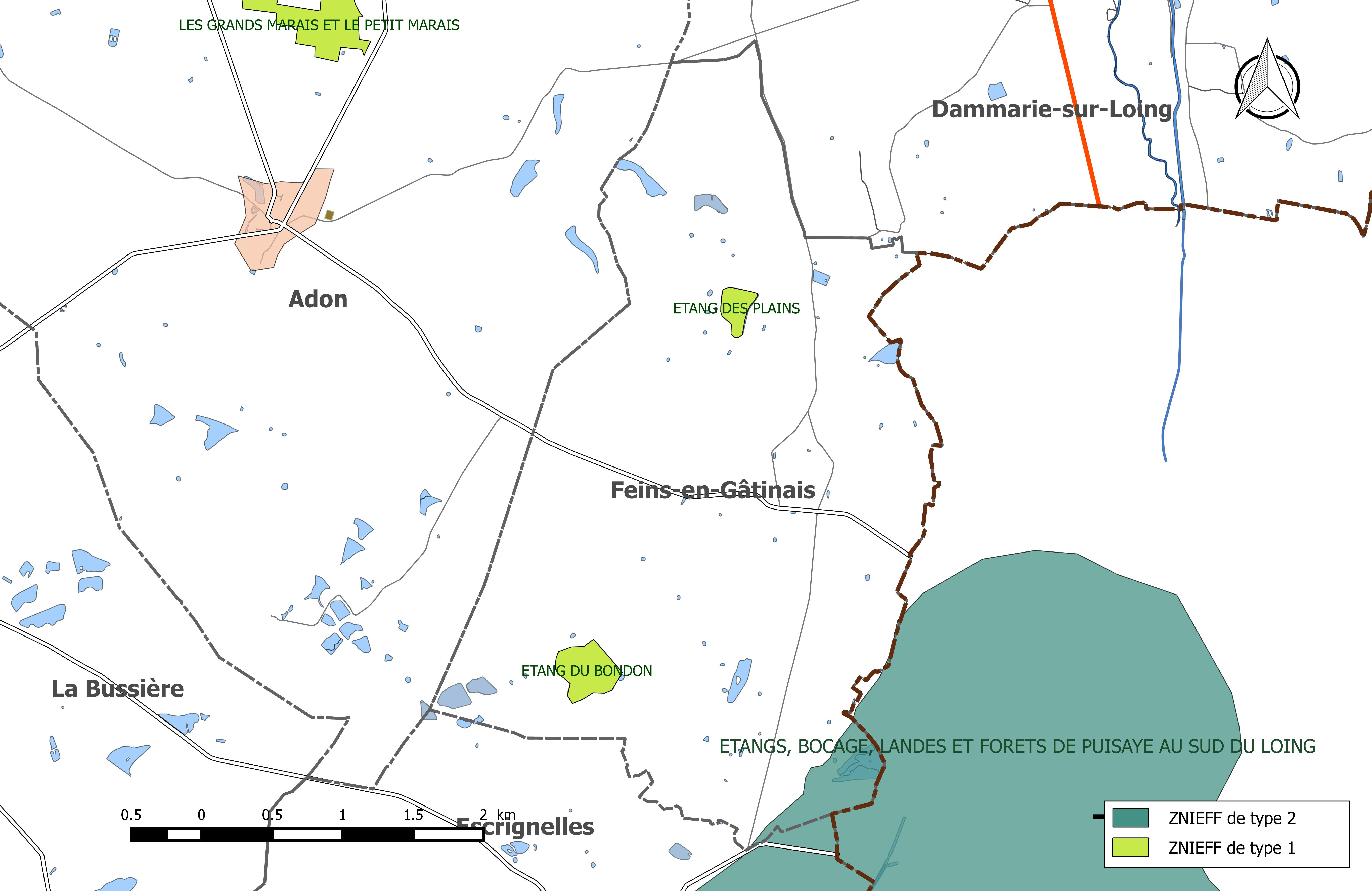 Carte des Zones naturelles d'intérêt écologique faunistique et Floristique (ZNIEFF) de la commune de Feins-en-Gâtinais.